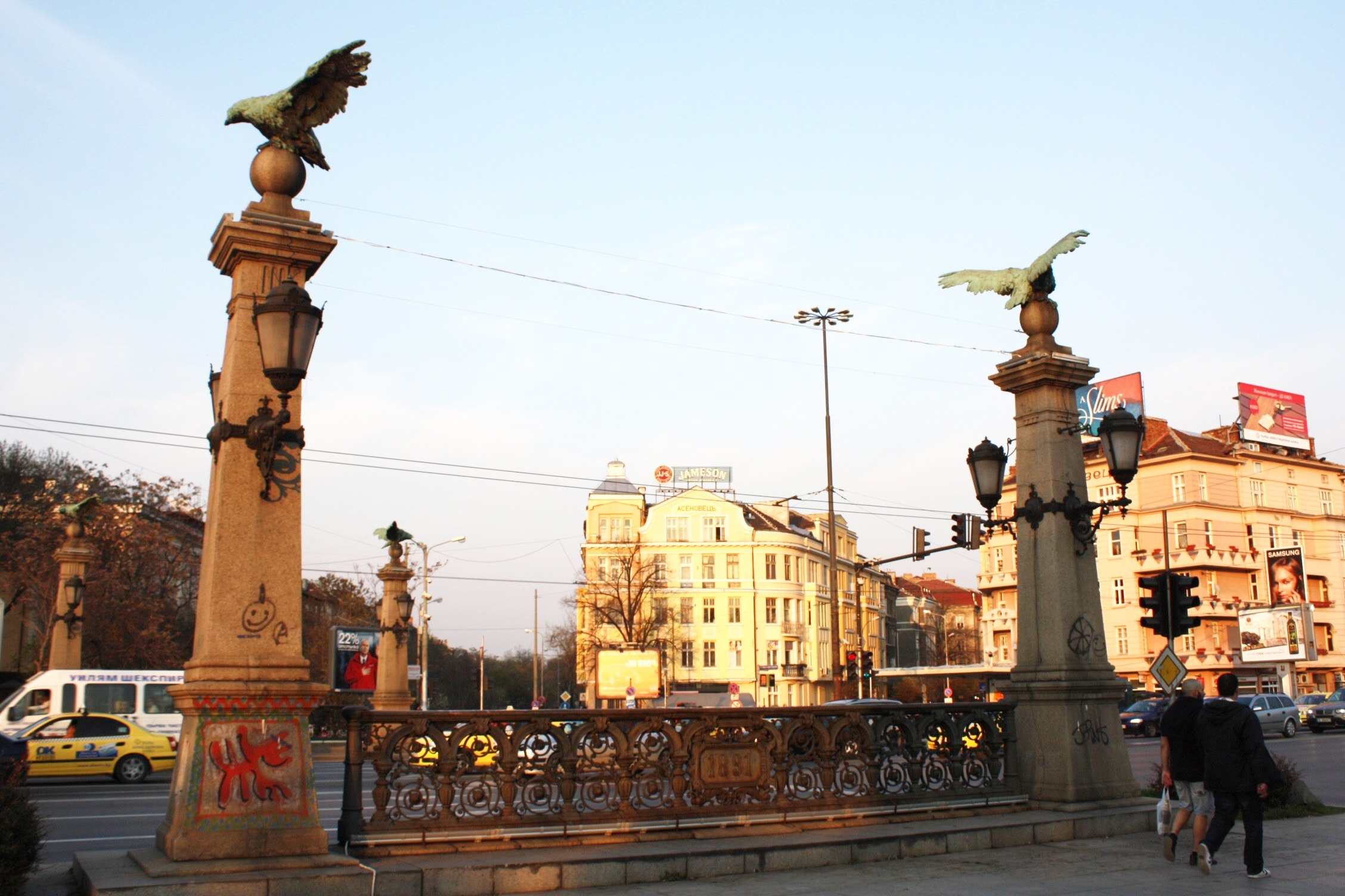 Adlerbrücke, Orlov most, Орлов мост, Sofia, Bulgaria